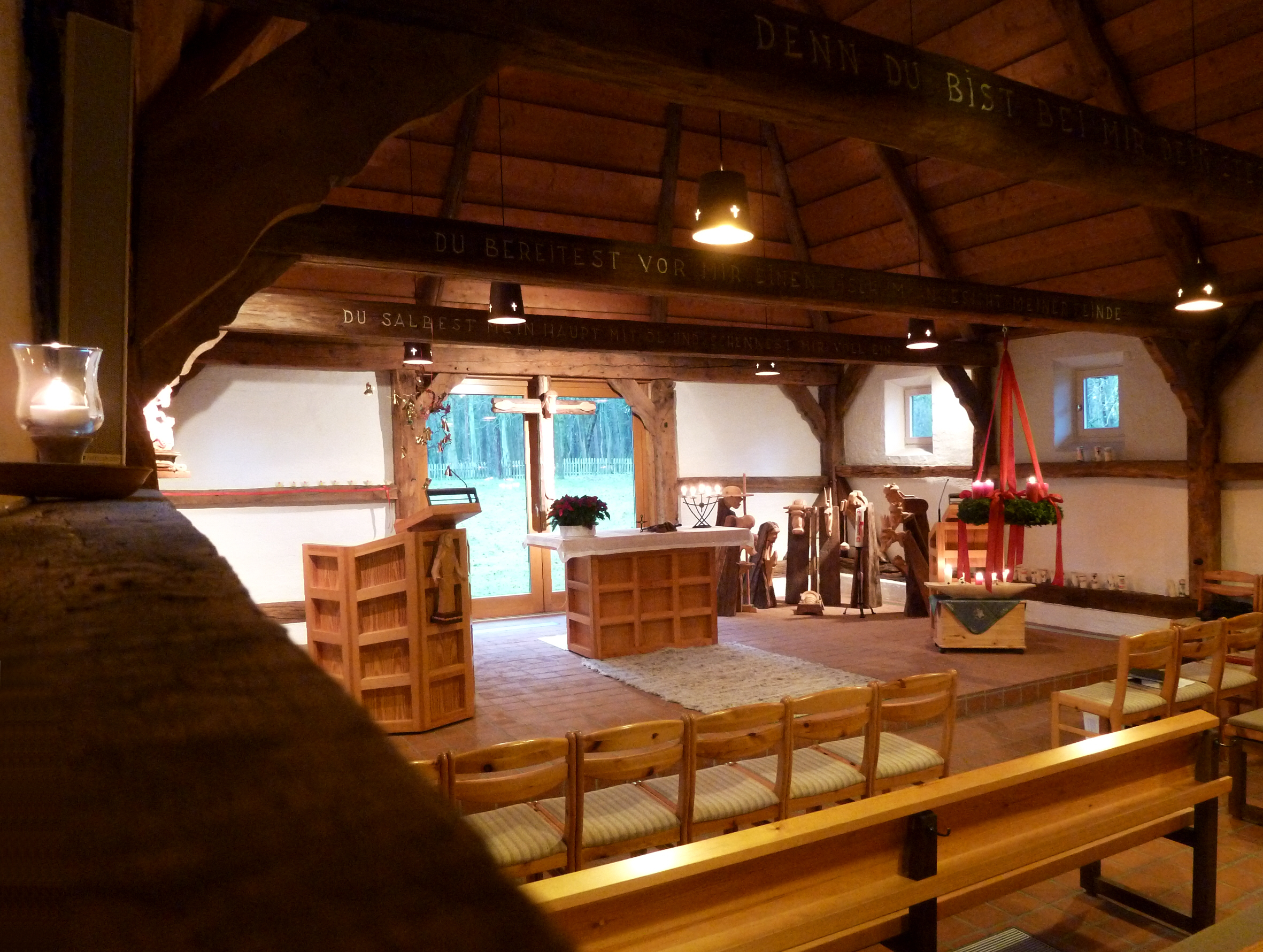 Die Schafstallkirche St. Martin zu Munster (Örtze) am vierten Advent 2011. Alle 4 Kerzen des Adventskranzes leuchten noch vom vorangegangenen Gottesdienst.